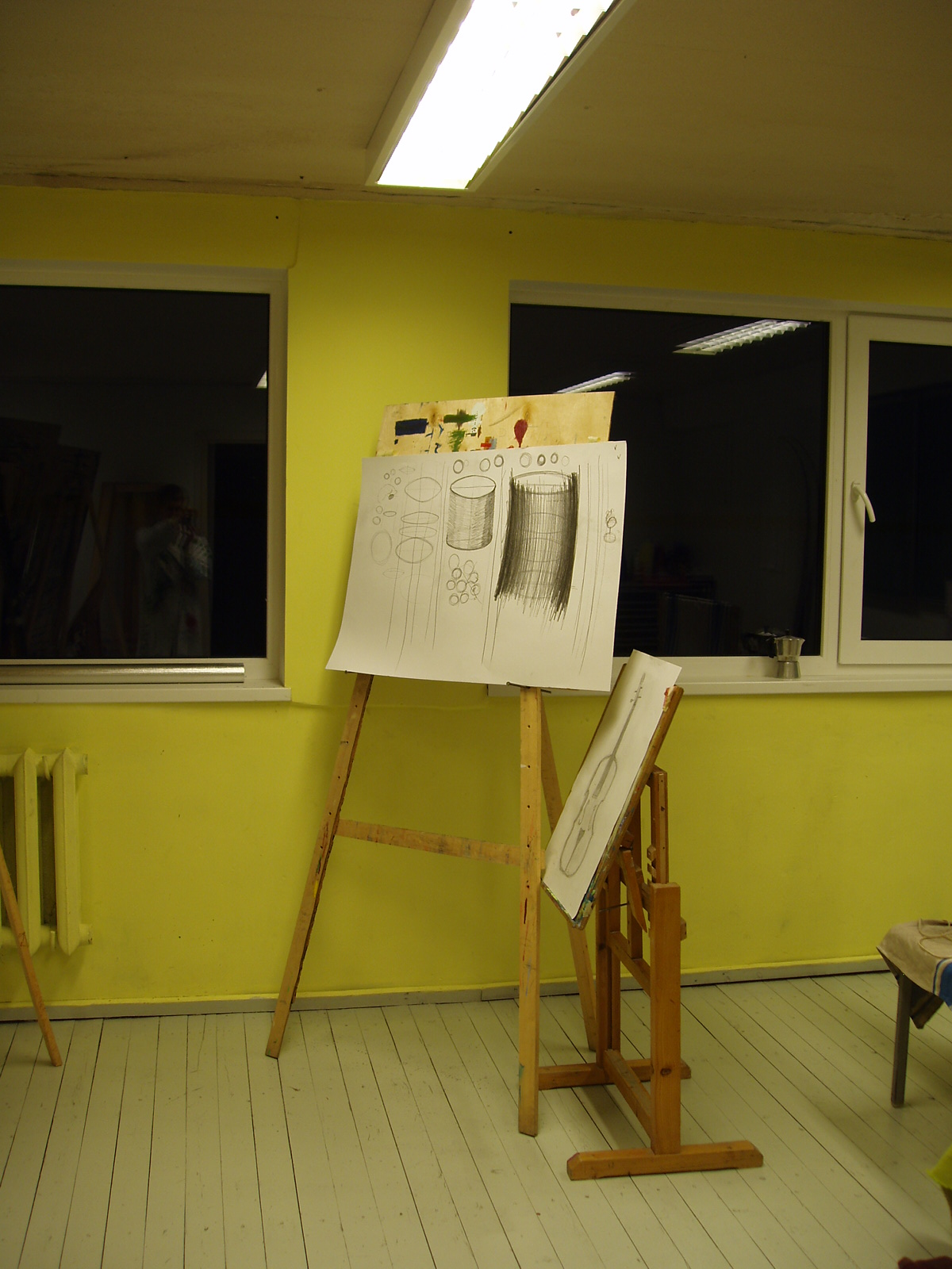 Kose Art School